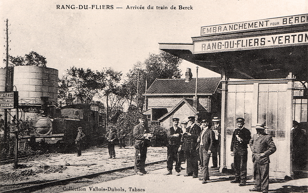 La gare de Rang-du-Fliers - Verton sur les lignes Amiens -Calais (voie normale) et Aire-sur-la-Lys Berck-Plage (voie métrique)